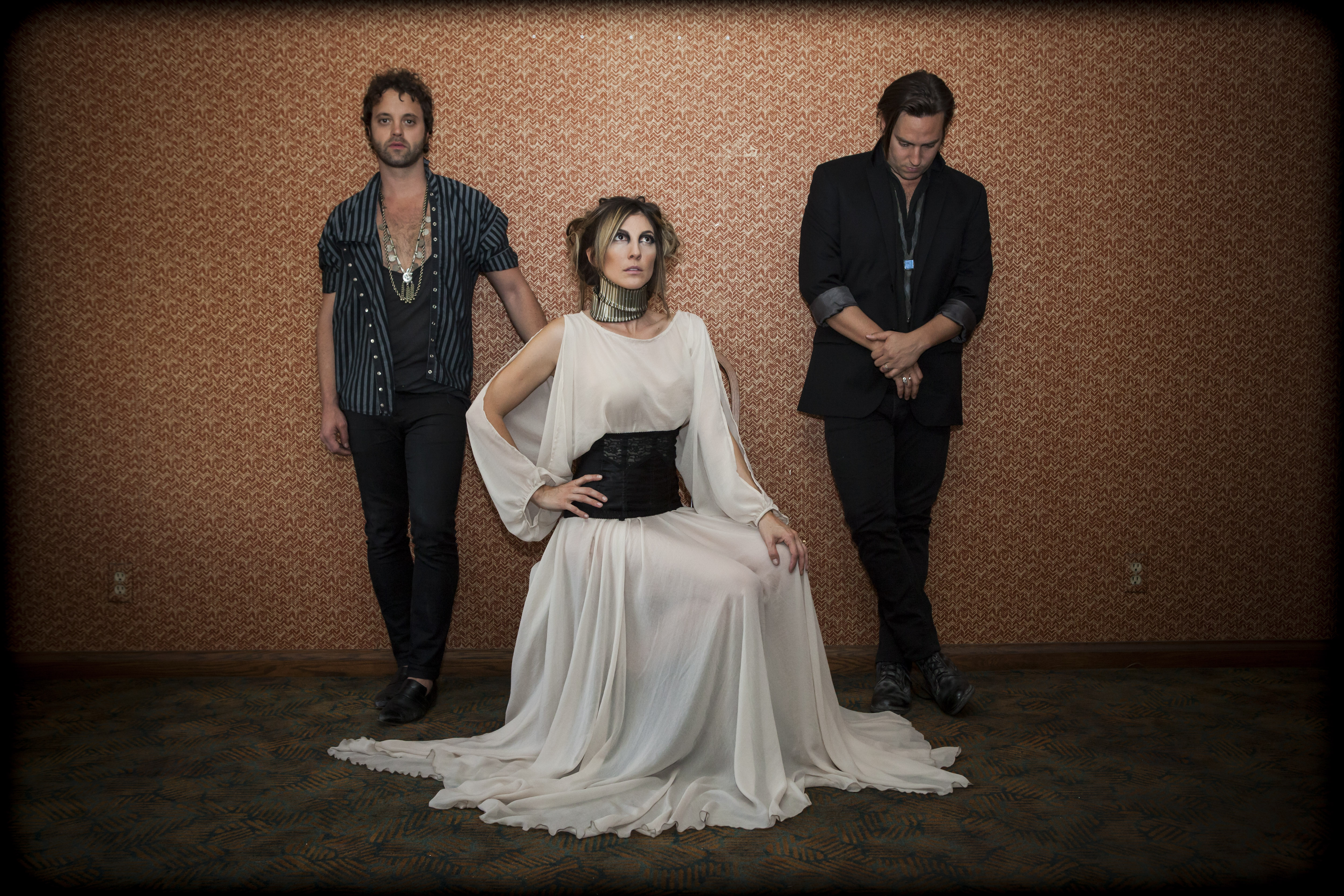 Nico Vega